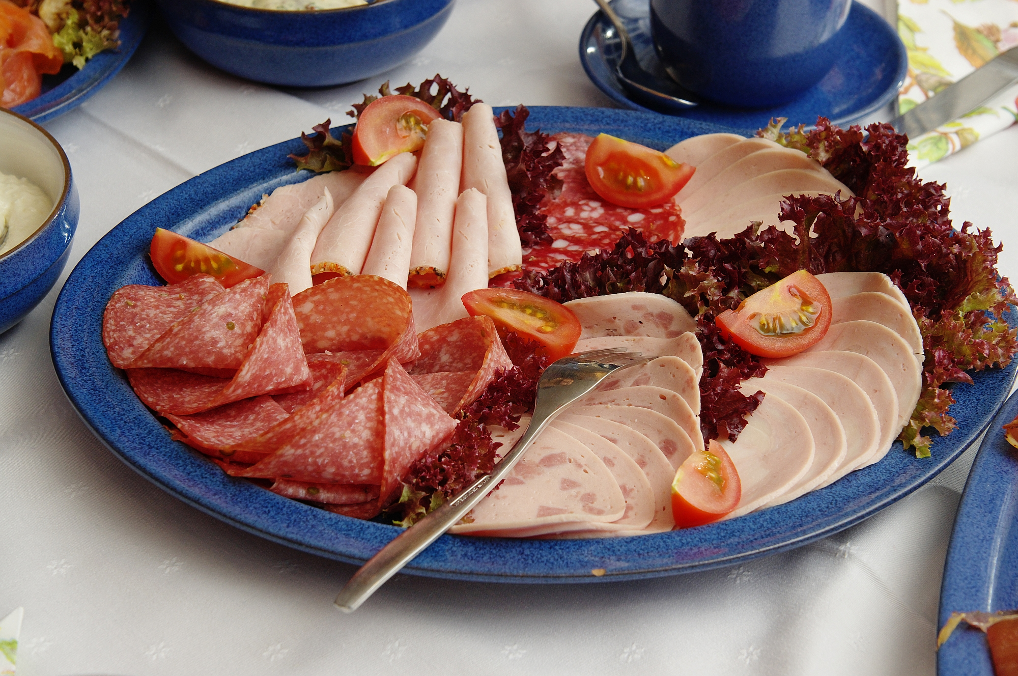 Frühstücksbuffet